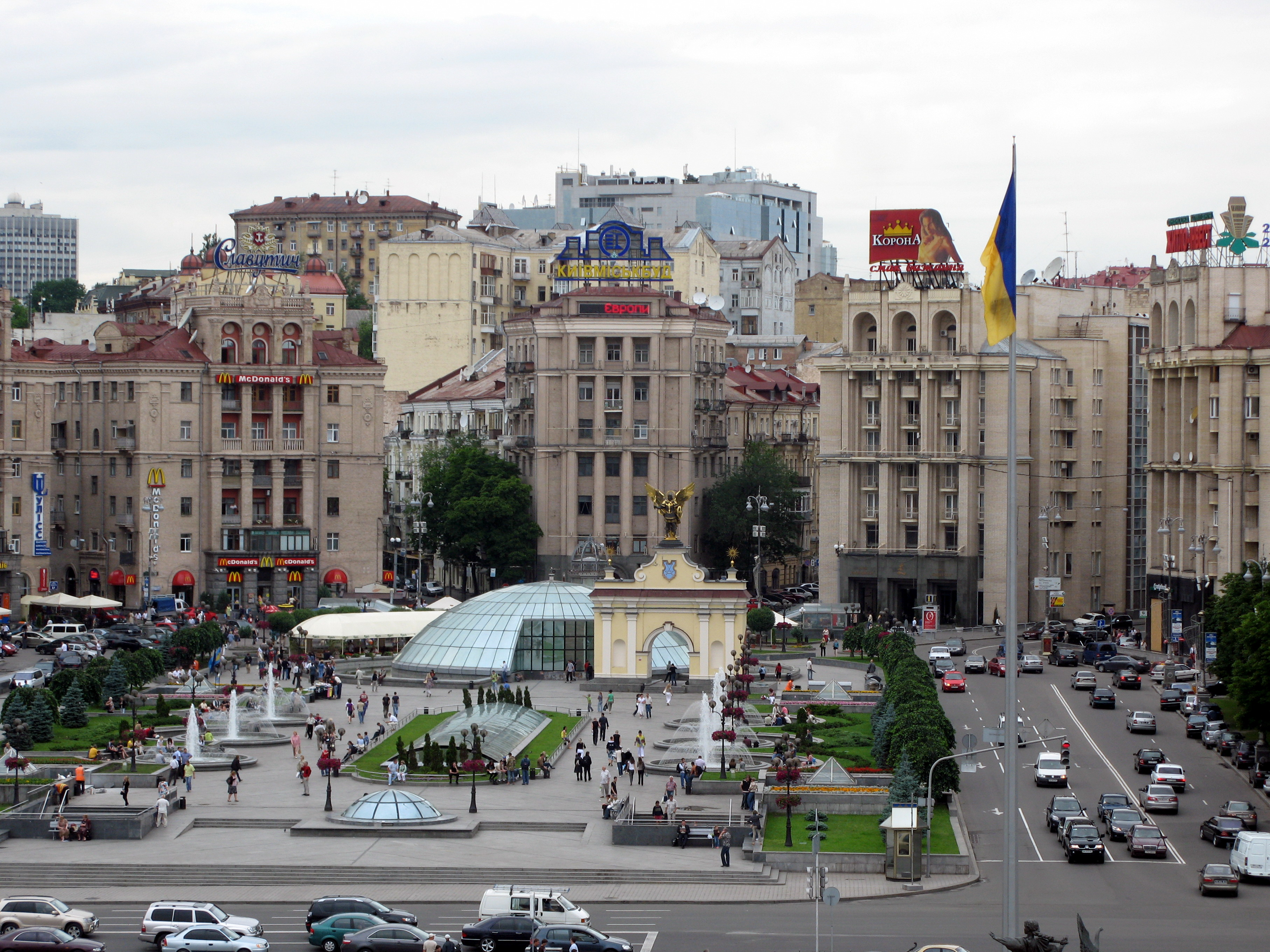 Фундаменти Лядських (Печерських) воріт, Незалежності Майдан, Київ